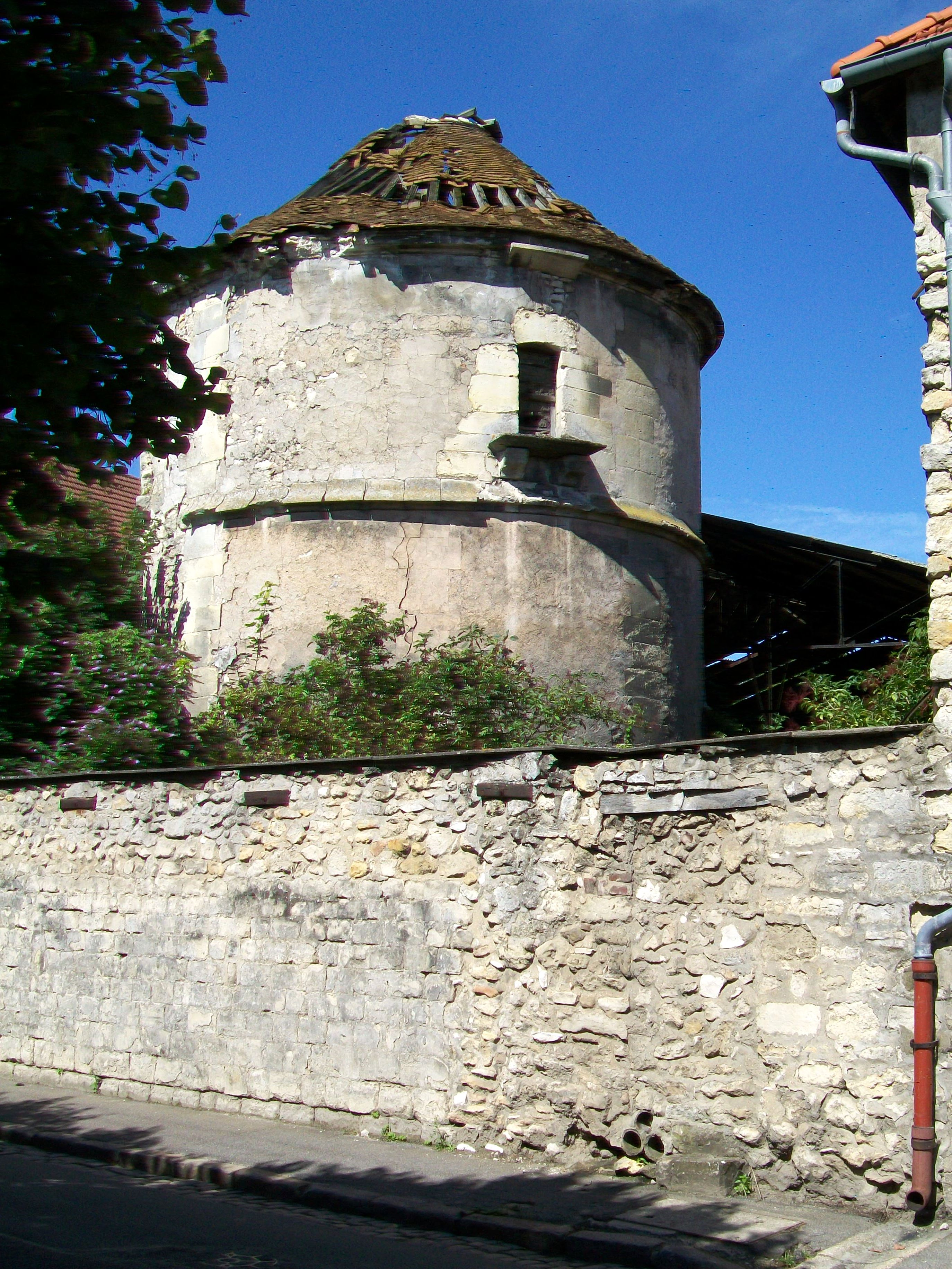 Le colombier ruiné de l'ancienne ferme des Montmorency, rue Brulée.